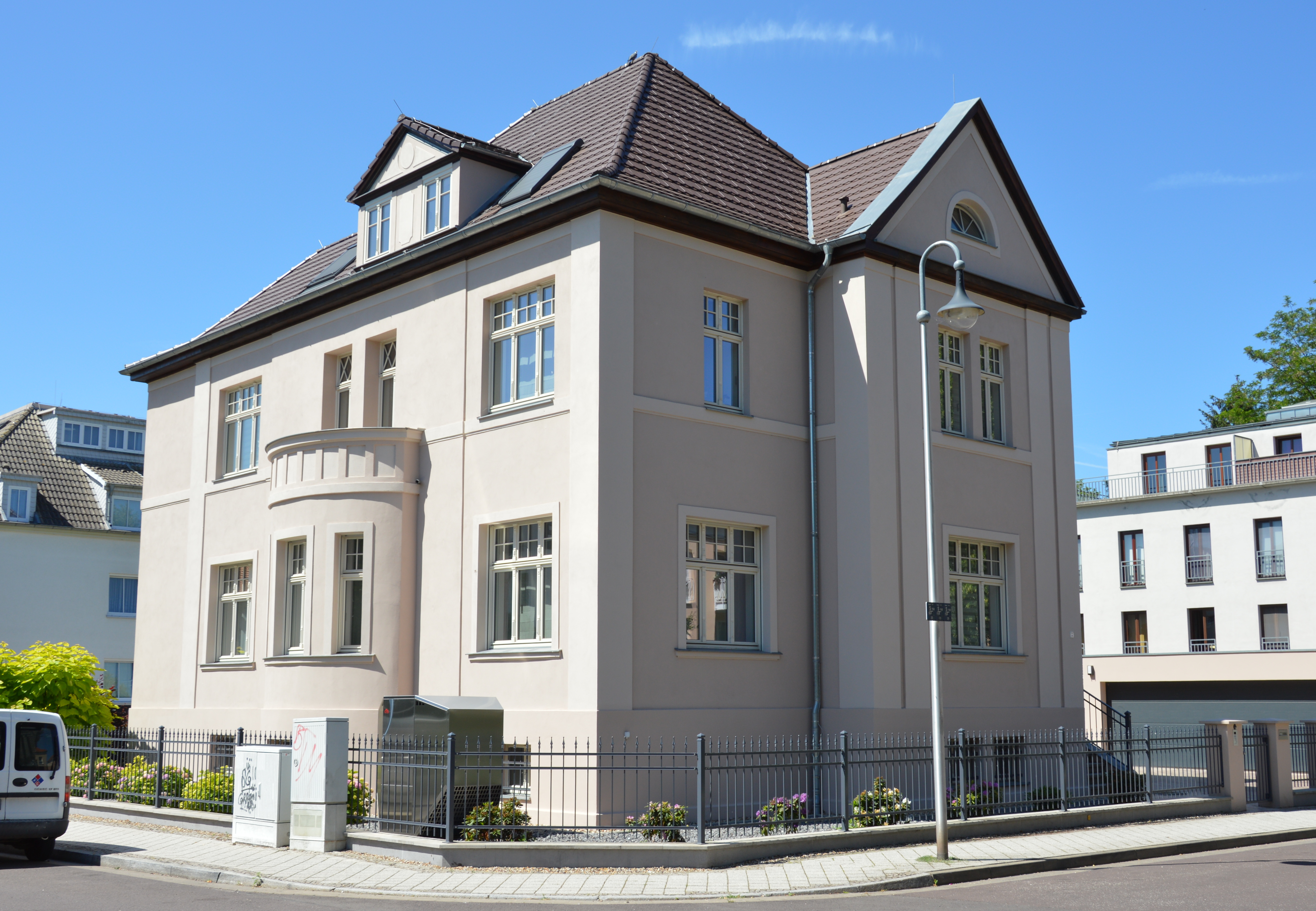 Villa Hauffstraße 10 in Magdeburg